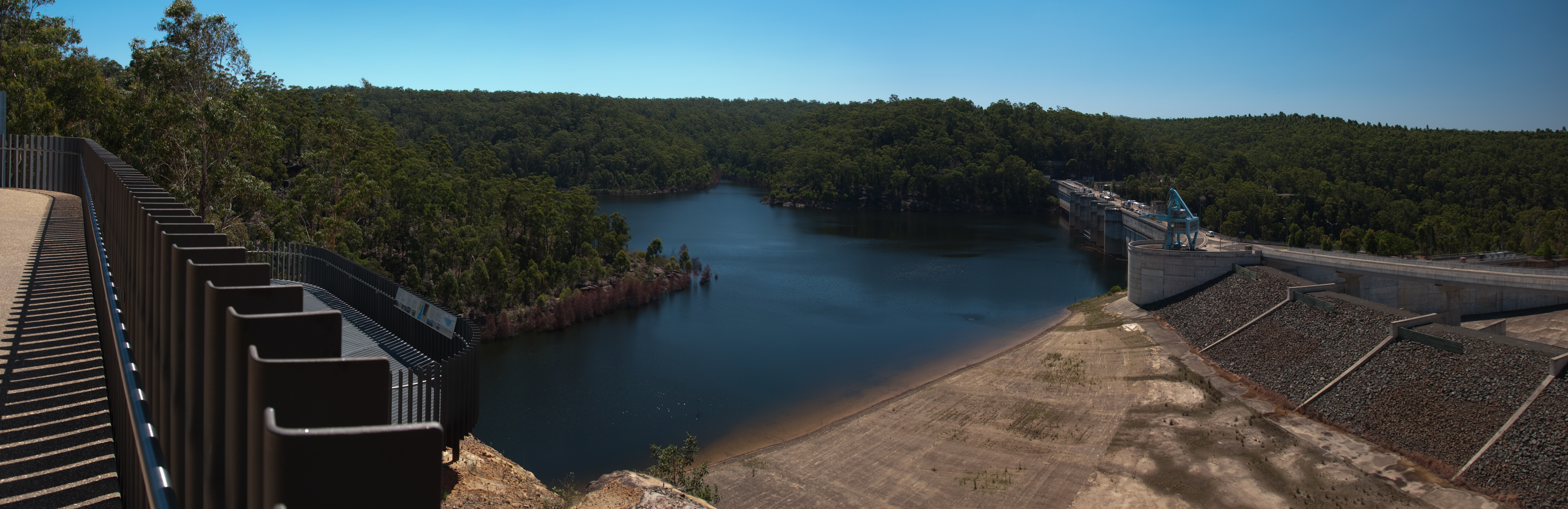 Warragamba Dam